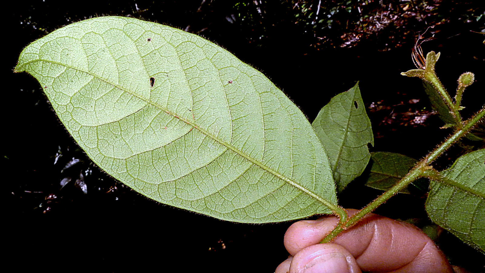 Hirtella santosii Prance